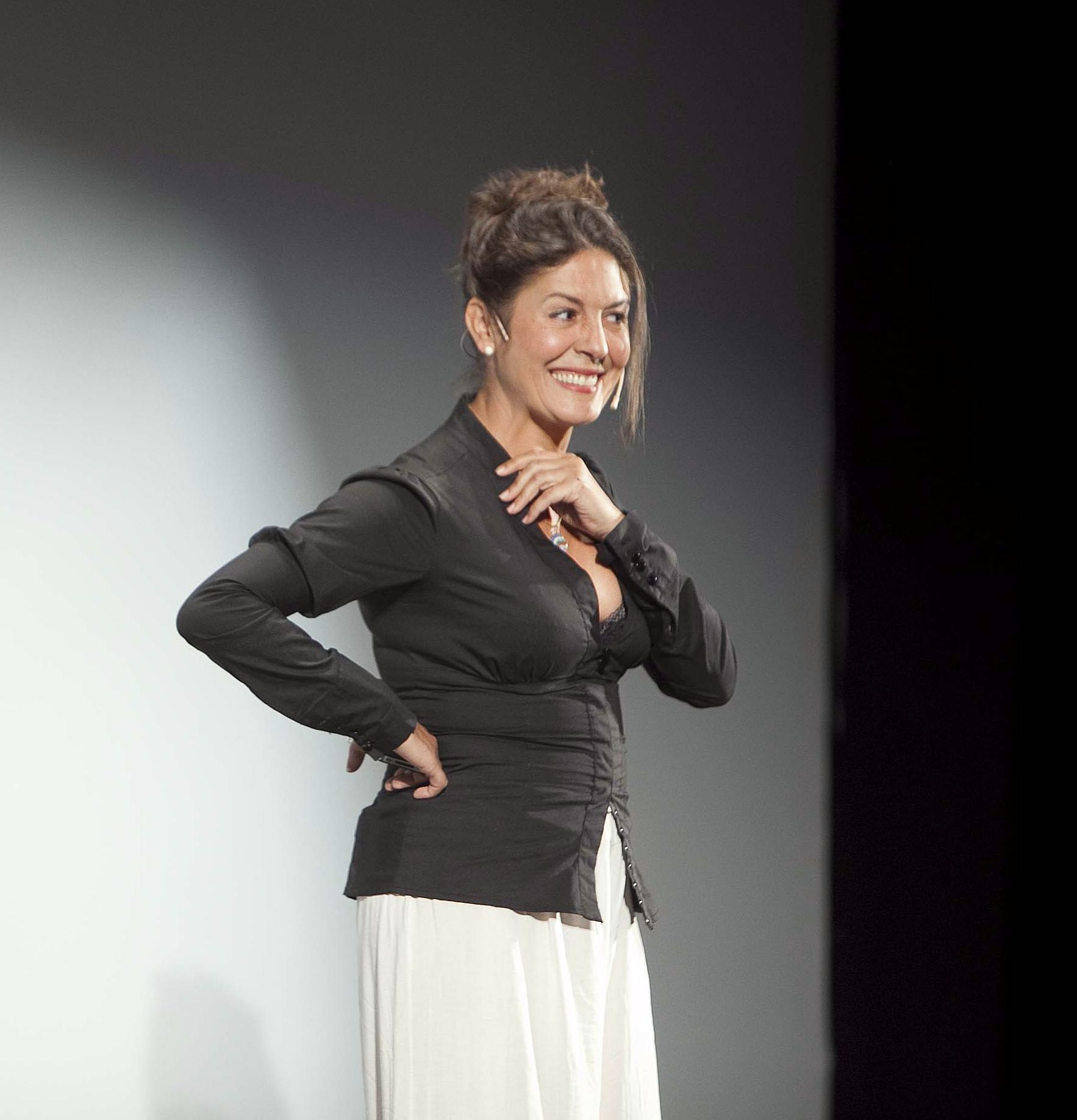 La actriz cordobesa Marisol Membrillo presenta la gala de clausura de la novena edición del festival